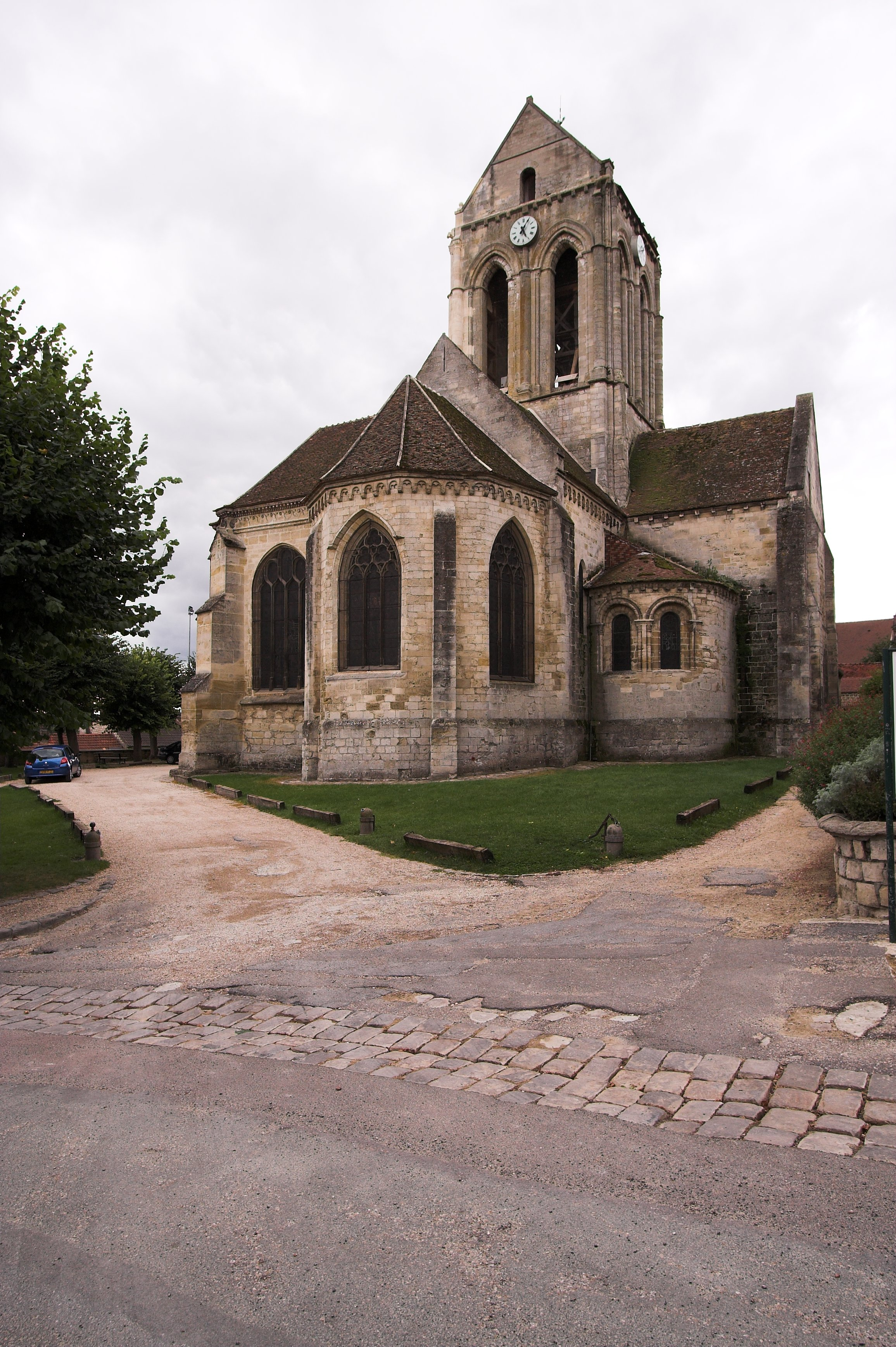 L'église Notre-Dame d'Auvers (Auvers-sur-Oise, France)